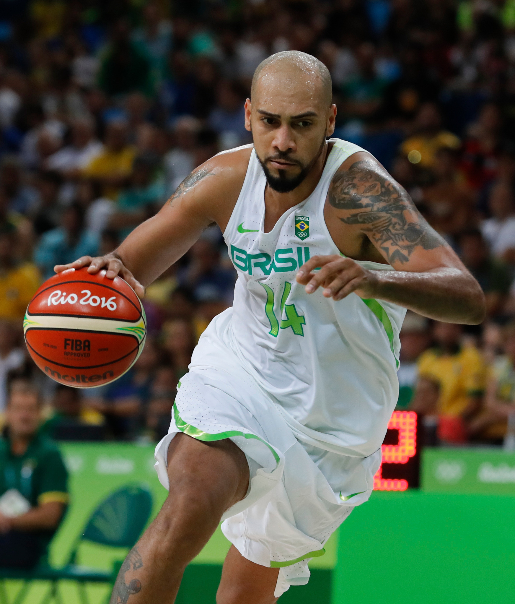 Rio de Janeiro - Basquete masculino do Brasil derrotado pela Lituânia por 76 a 82 na estria nos Jogos Olmpicos Rio 2016, na Arena Carioca, no Parque Olmpico. (Fernando Frazão/Agência Brasil)